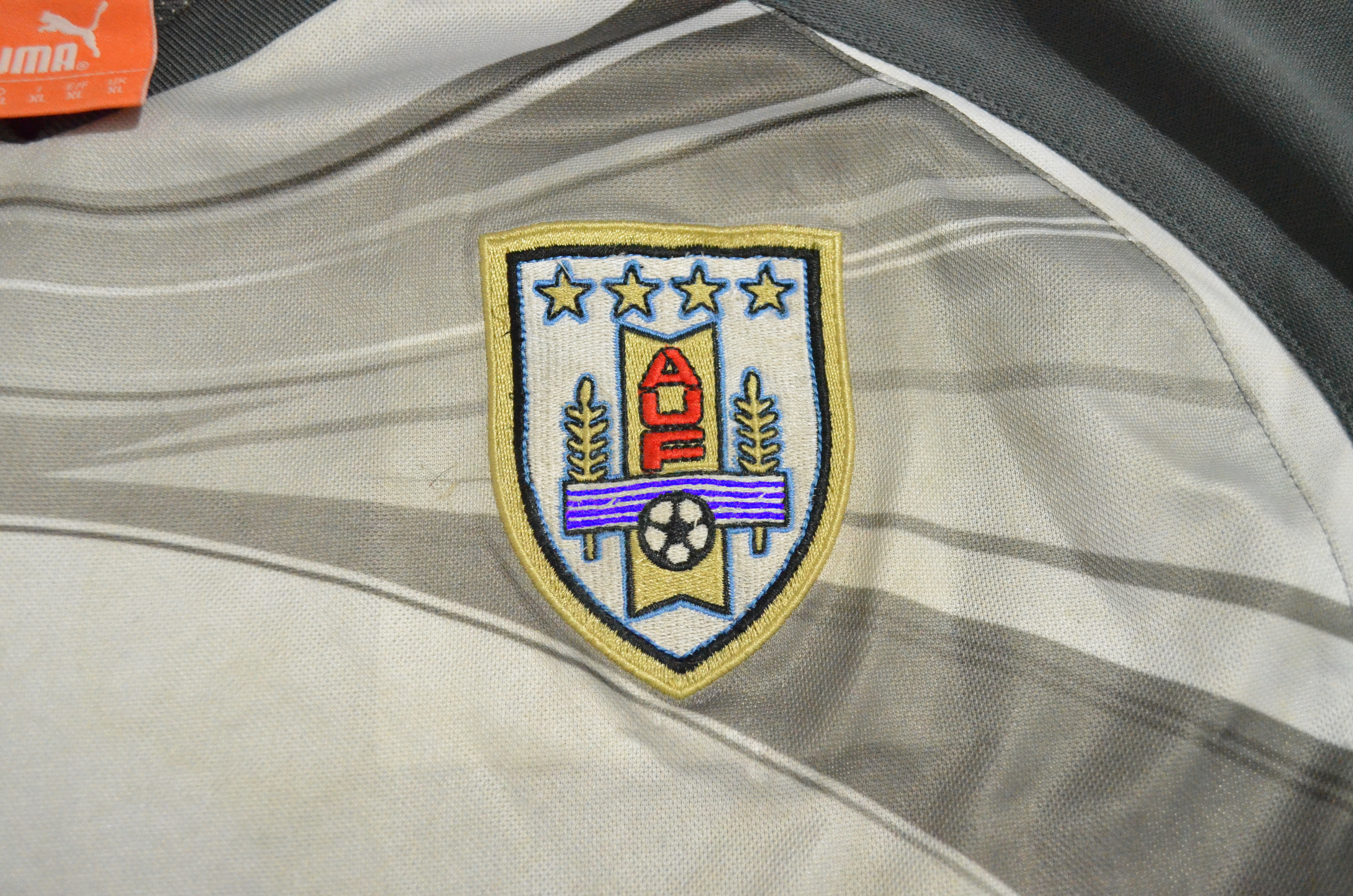 Camiseta entrenamiento de la selección de Uruguay